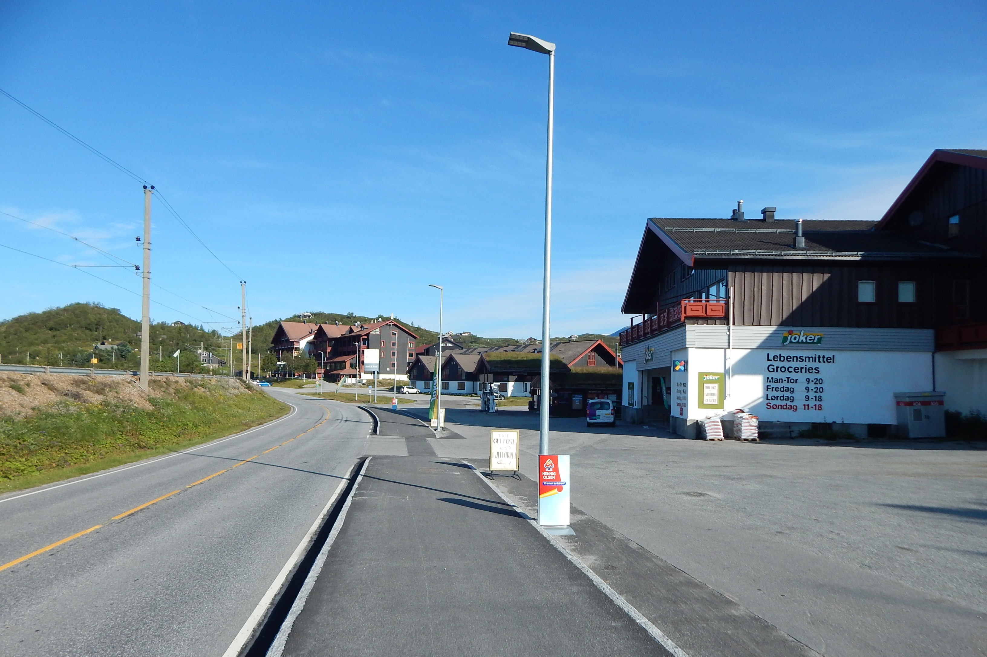 Riksvei 7 ved Ustaoset